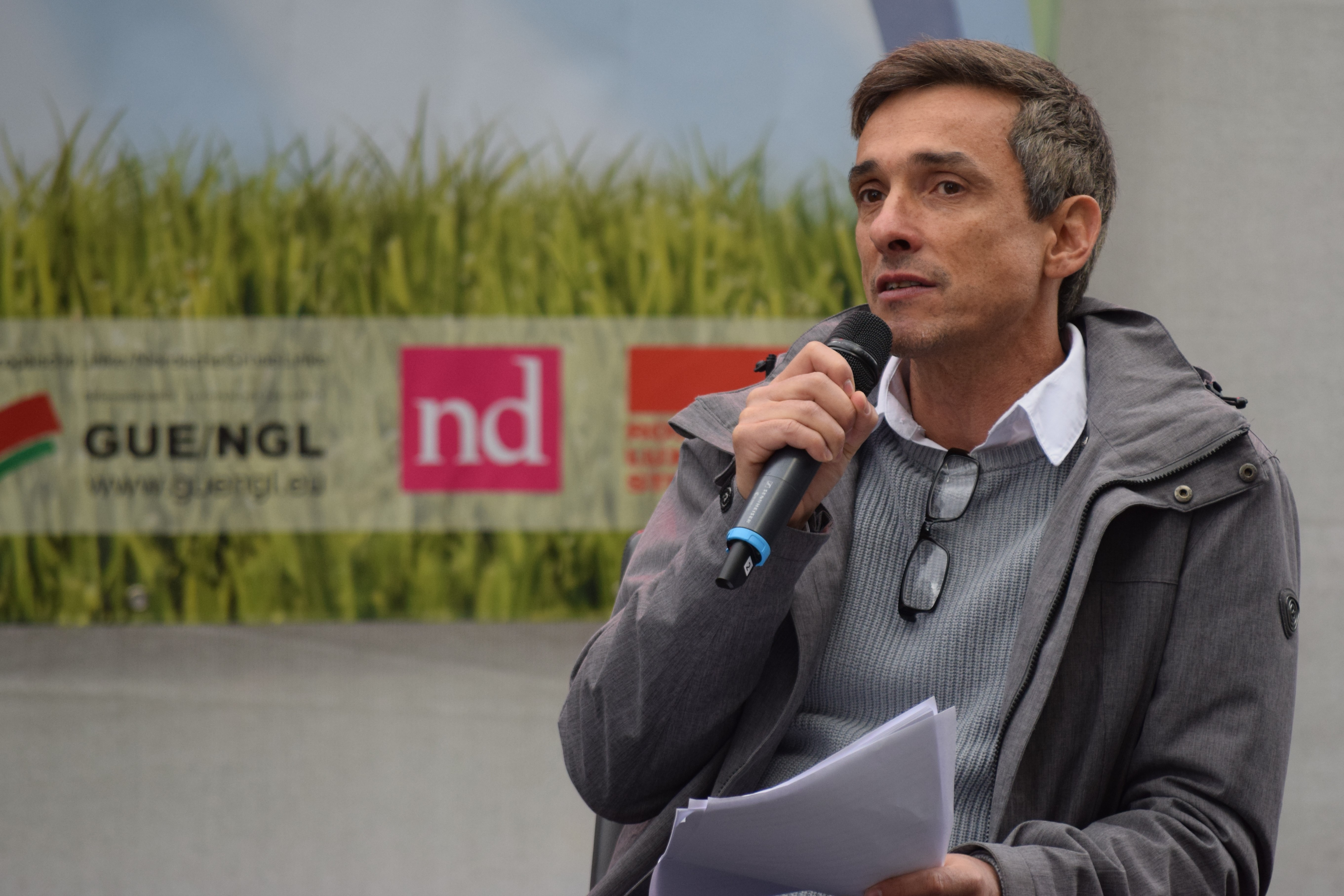 Raul Zelik auf dem Fest der Linken 2018. Rosa Luxemburg Platz, Berlin. Samstag 23.06.2018.